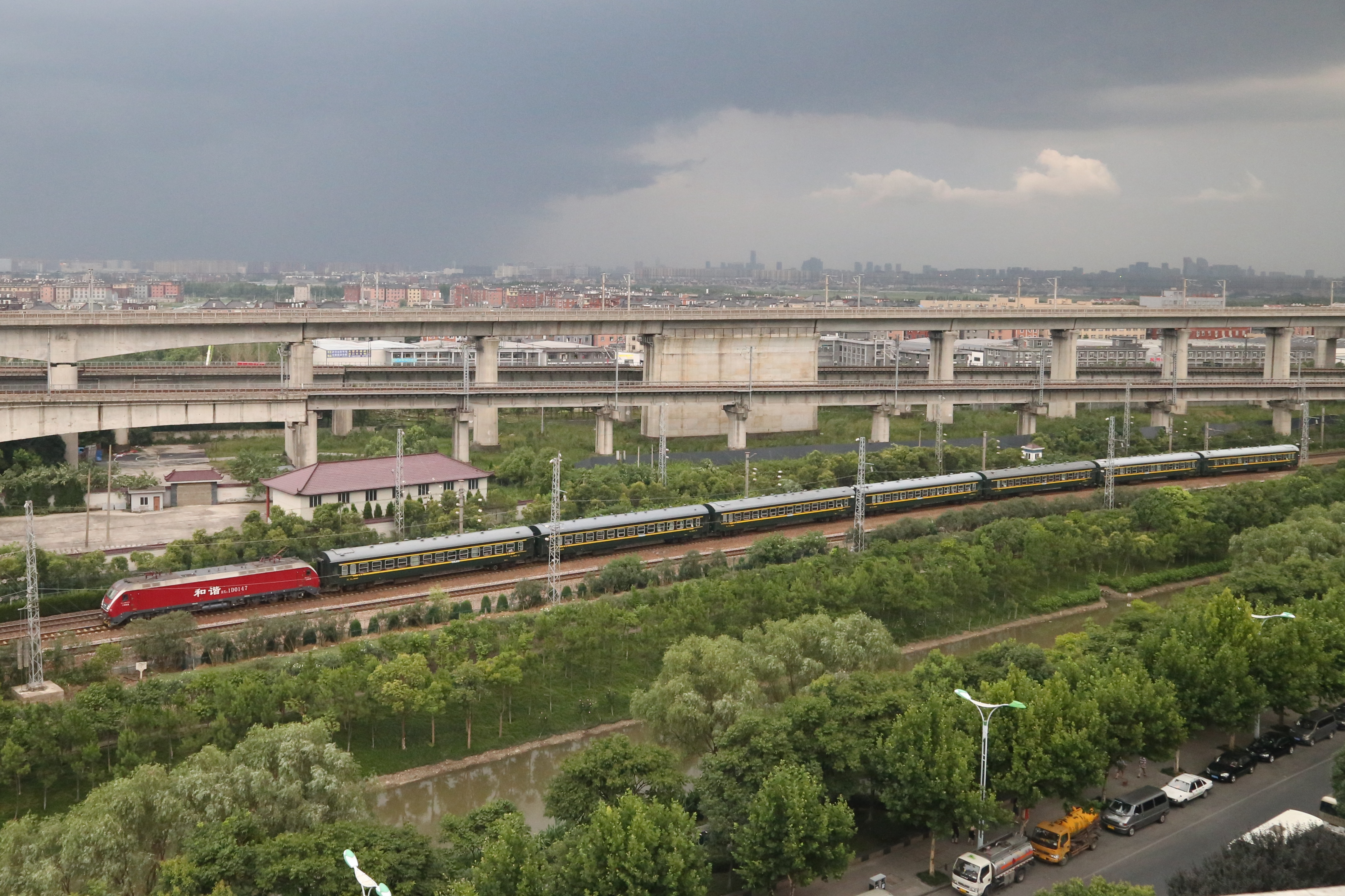 HXD1D拉南星桥-乔司通勤车通过丁桥